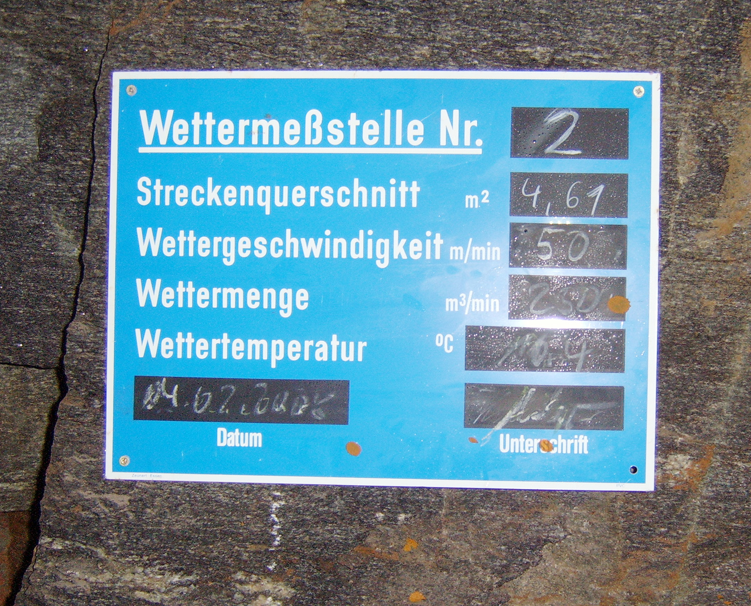 Eine Wettertafel ist eine Kontrolltafel unter Tage, auf der die erfolgte Überprüfung der Luftreinheit mit Datum, Uhrzeit und Unterschrift der Kontrollperson vermerkt wird (hier in der Freiberger Grube "Reiche Zeche").